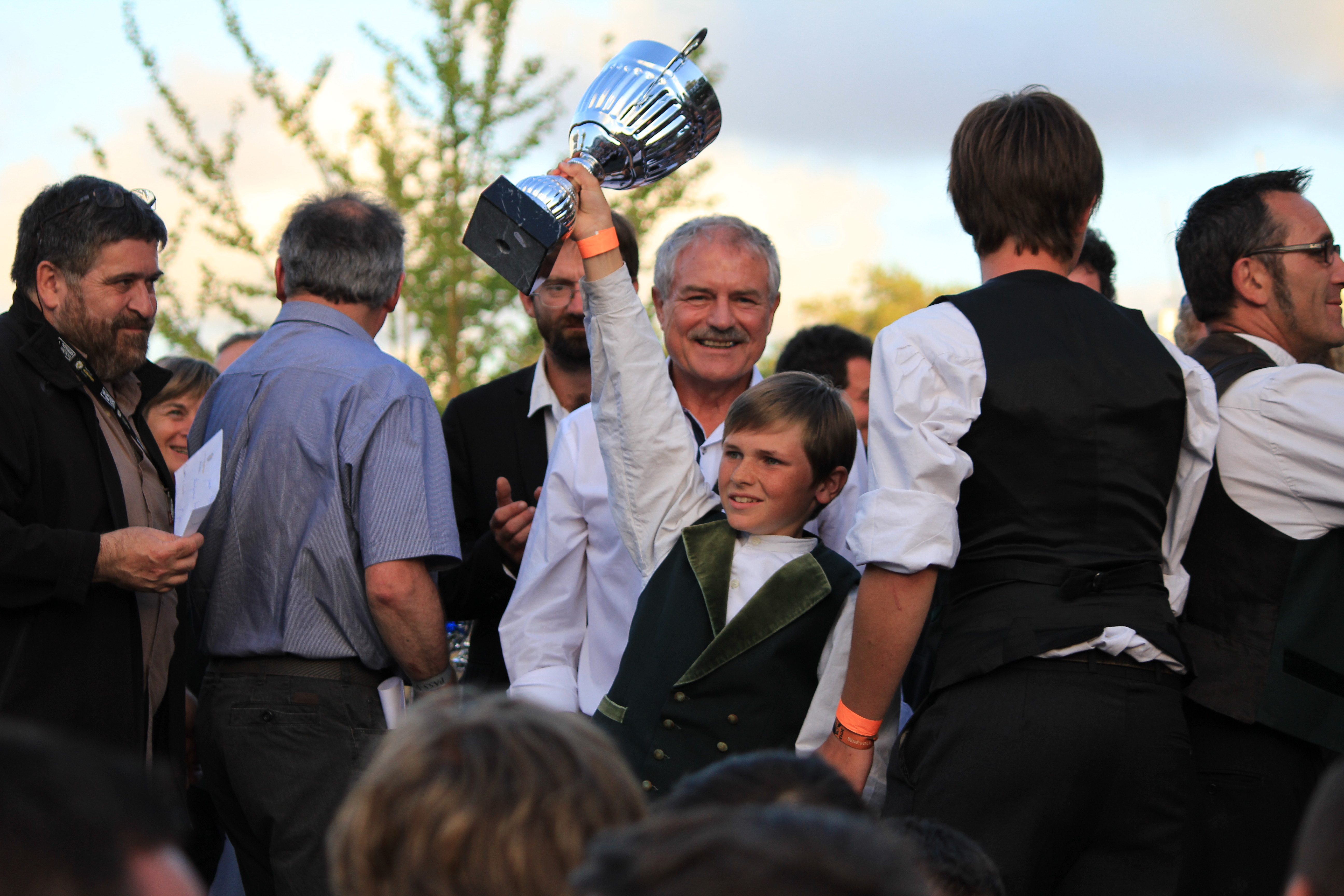 Annonce des résultats du championnat national des bagadoù 2013 dans le cadre du festival interceltique de Lorient : Bagad Pañvrid